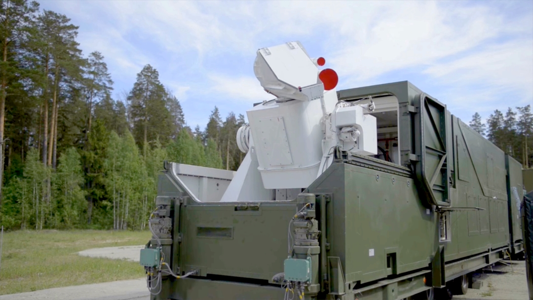 Боевой лазерный комплекс на позиции, излучатель в боевом положении